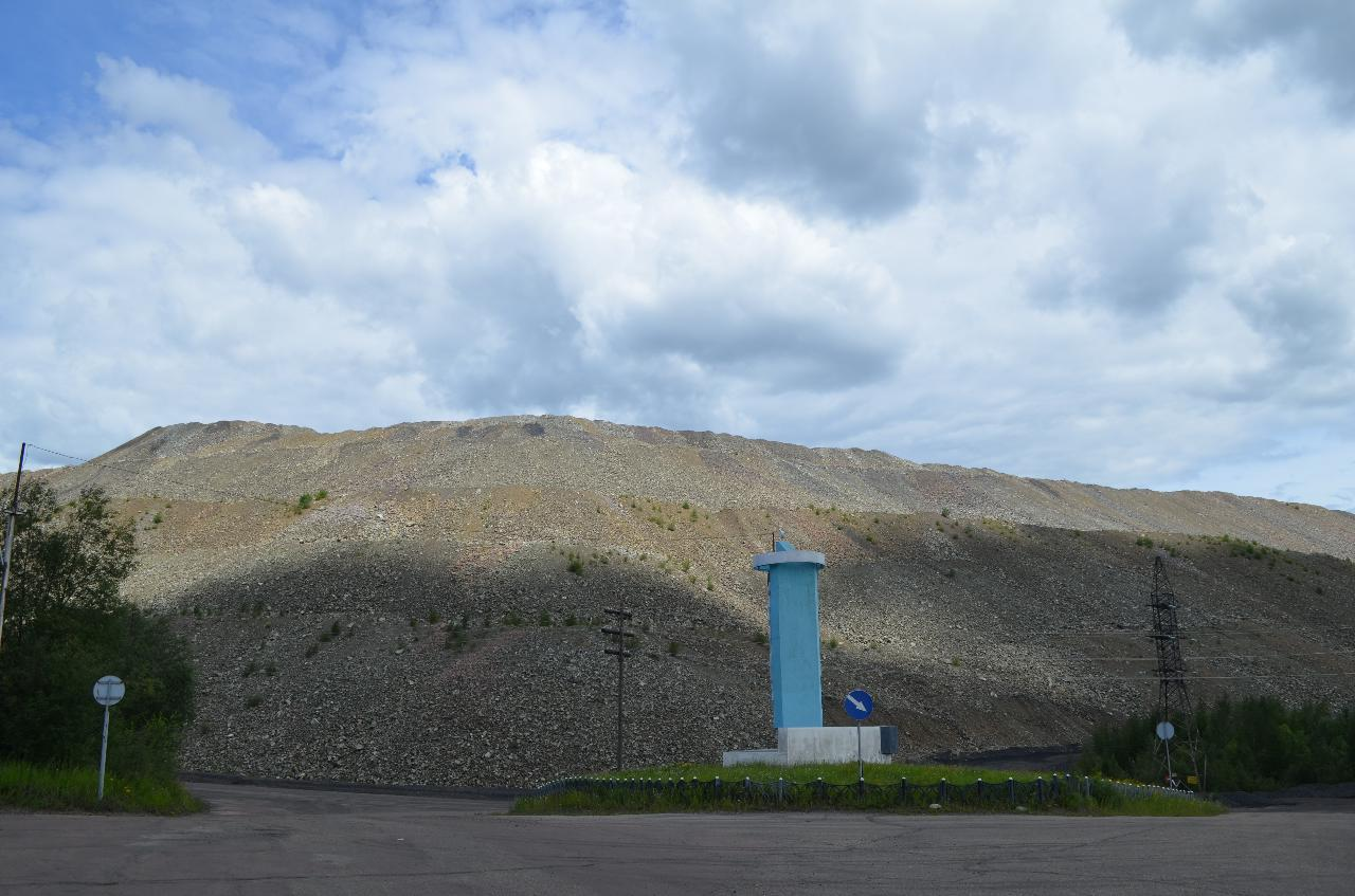 Нерюнгри. Рядом с адм. зданием Нерюнгринского угольного разреза. Вид на отвалы